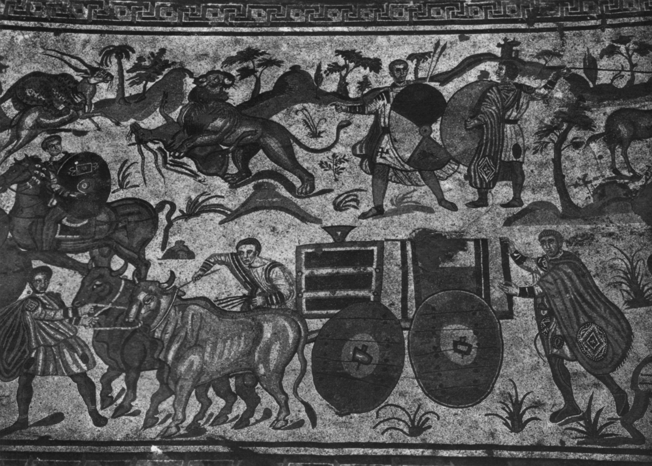 Mosaico della grande caccia 02